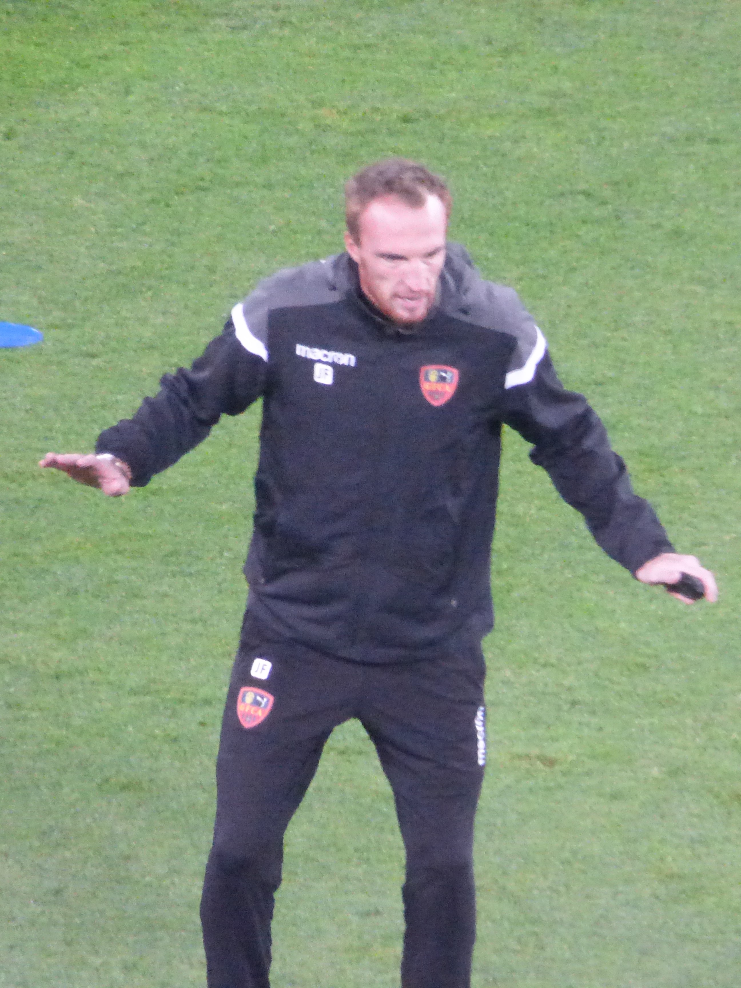 Julien François avant le match RC Lens / GFC Ajaccio, comptant pour la onzième journée du championnat de France de Ligue 2 2018-2019 au Stade Bollaert-Delelis, le 22 octobre 2018.